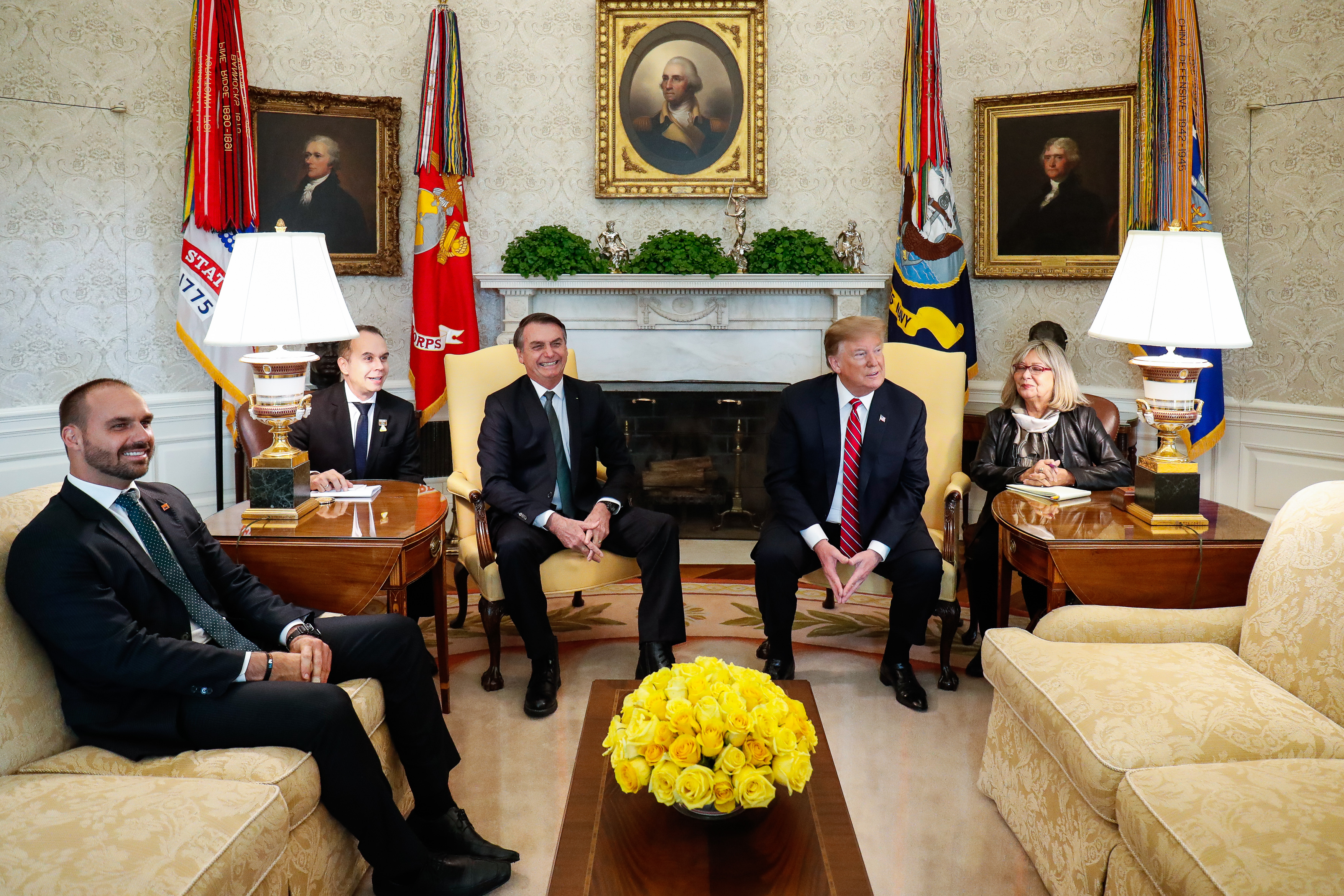 (Washington, DC - EUA 19/03/2019) Encontro com o Senhor Donald Trump, Presidente dos Estados Unidos da América. Foto: Alan Santos/PR